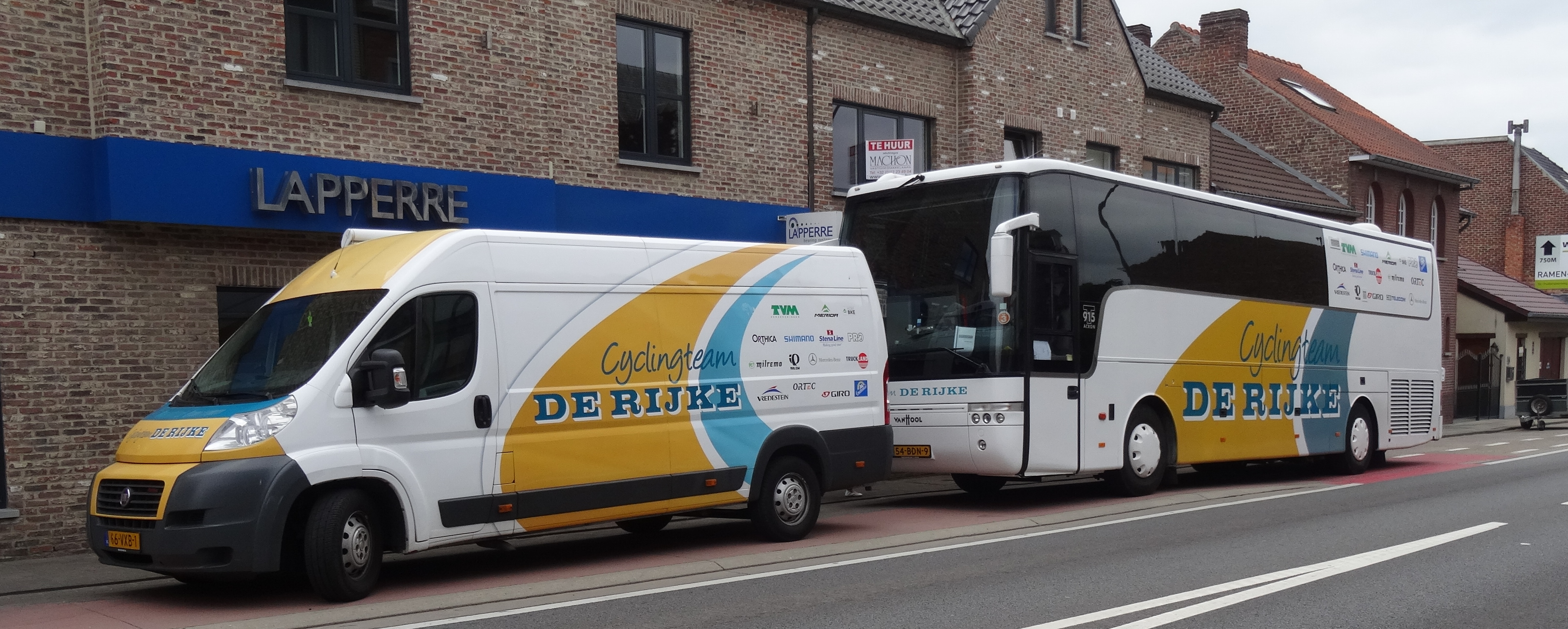 Reportage photographique réalisé le dimanche 15 juin à l'occasion du départ et de l'arrivée du Tour du Limbourg 2014 à Tongres, Belgique.